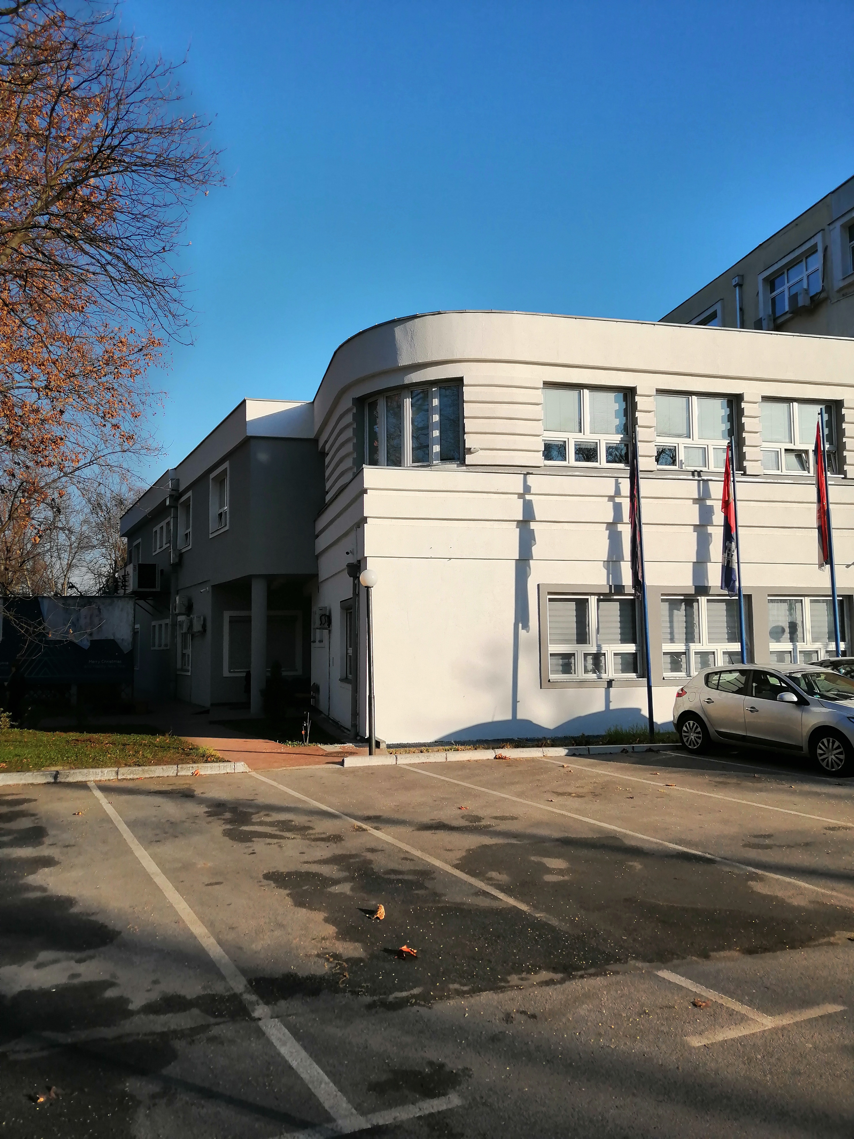 Fakultet organizacionih nauka, Beograd